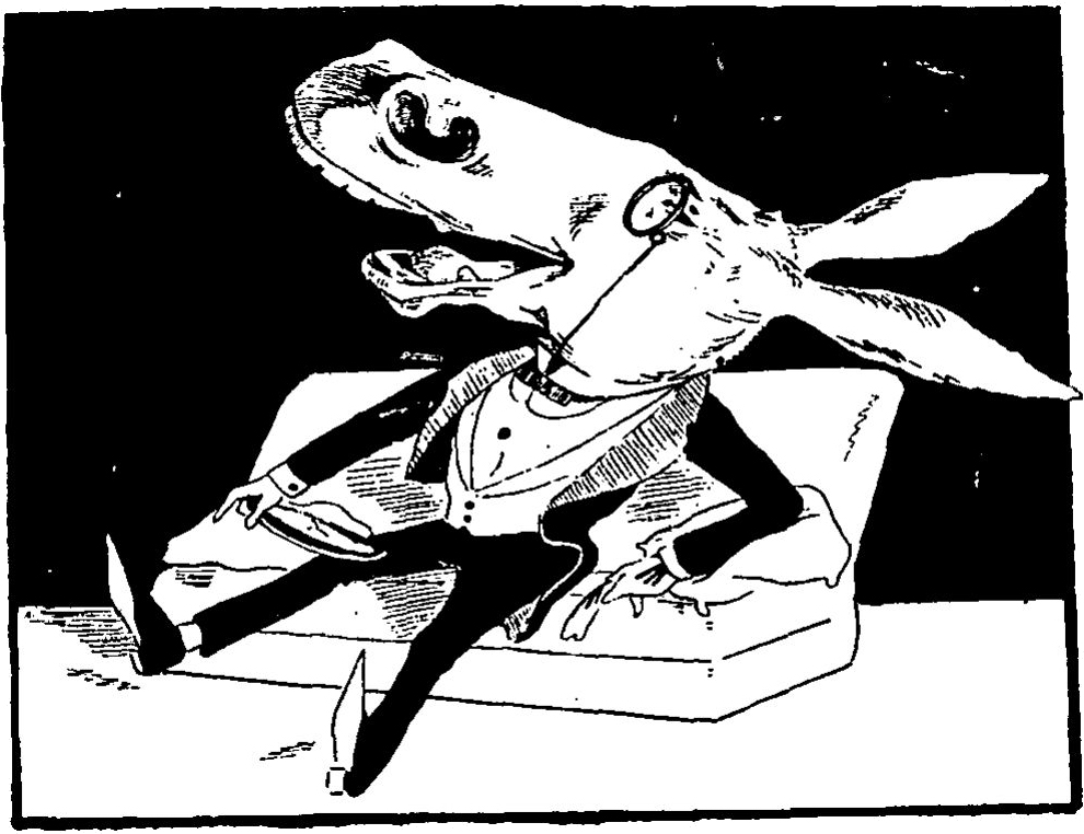 scan de la page 17 du livre de Coquelin Cadet "Le Rire", montrant une illustration de Sapeck.